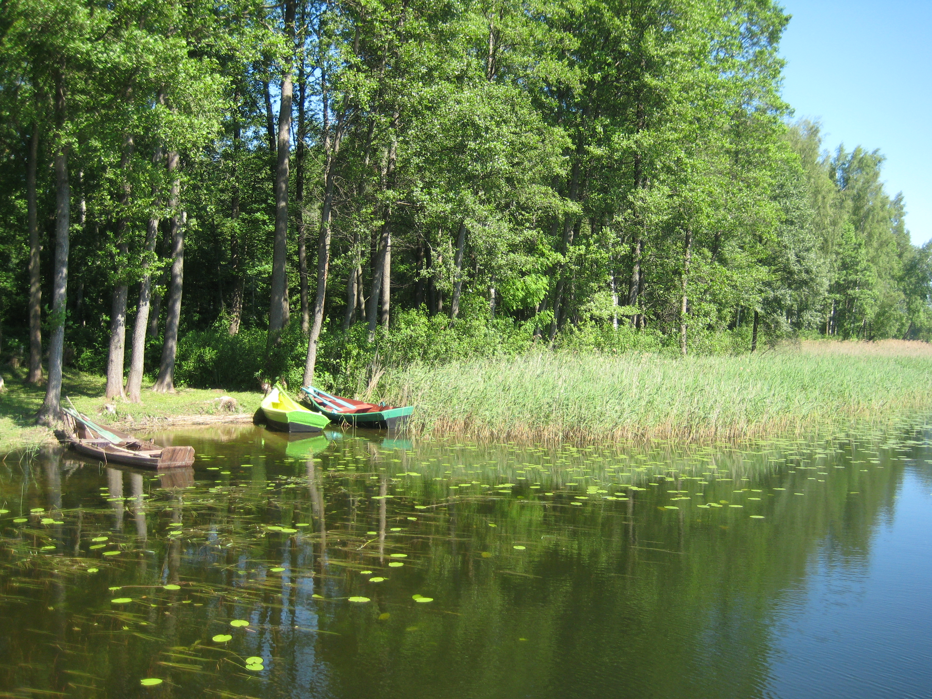 Imbrado sen., Lithuania